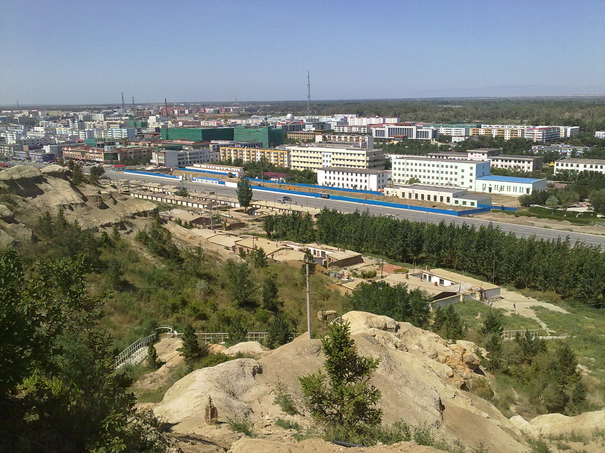 从得仁山上俯瞰北屯市区远处是北屯中学